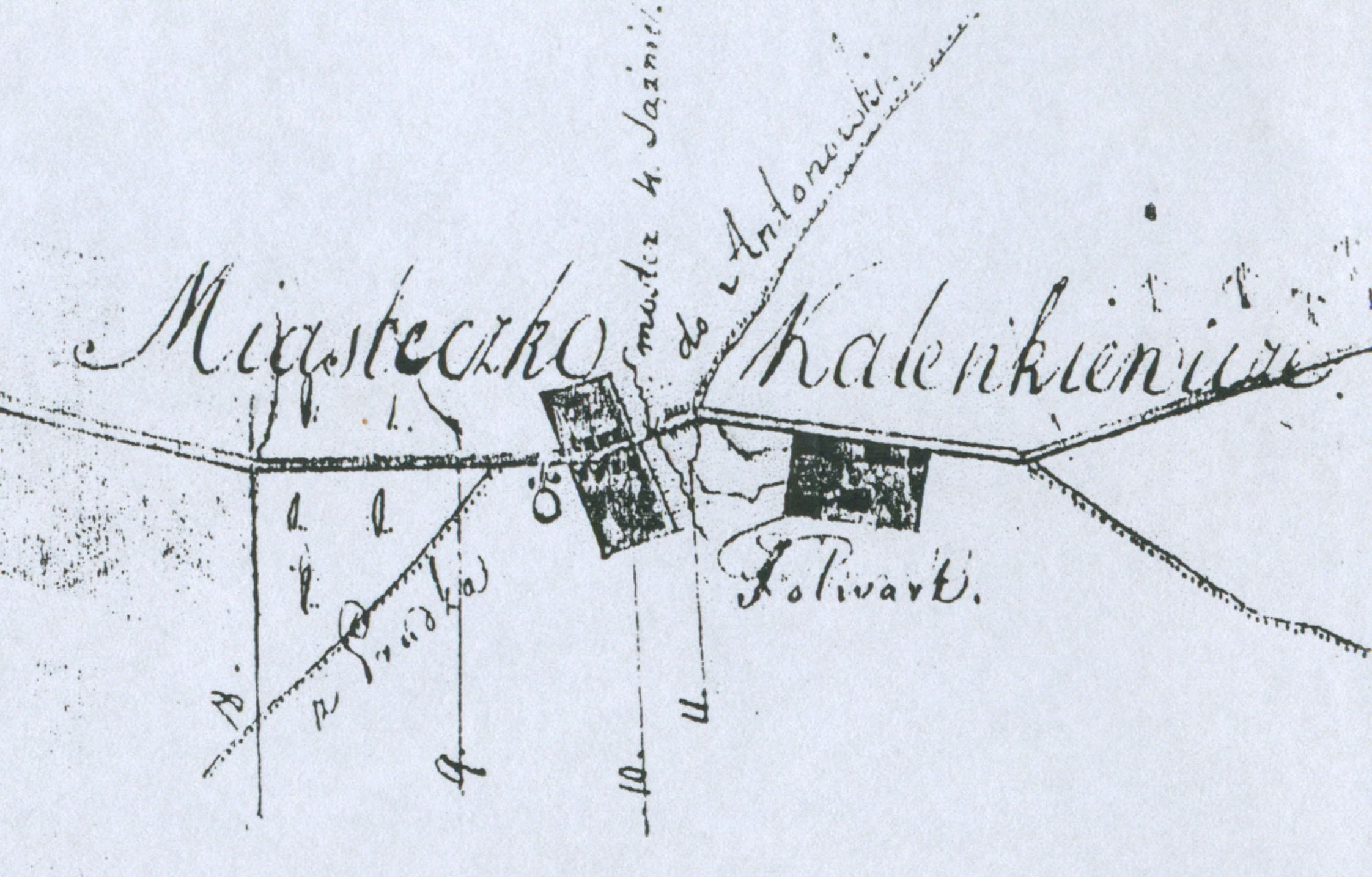 Беларуская (тарашкевіца): Каленкавічы (Kalenkavičy). Плян з мапы пачатку XIX ст.